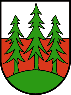 Bizau, Vorarlberg: In einem von Silber über Rot geteilten Schilde erheben sich aus grünem Rasenboden drei natürliche Tannen, die mittlere etwas höher als die beiden äußeren. Den Schild umgibt eine ornamentierte bronzefarbige Randeinfassung. (Verleihung: 16. Februar 1929)